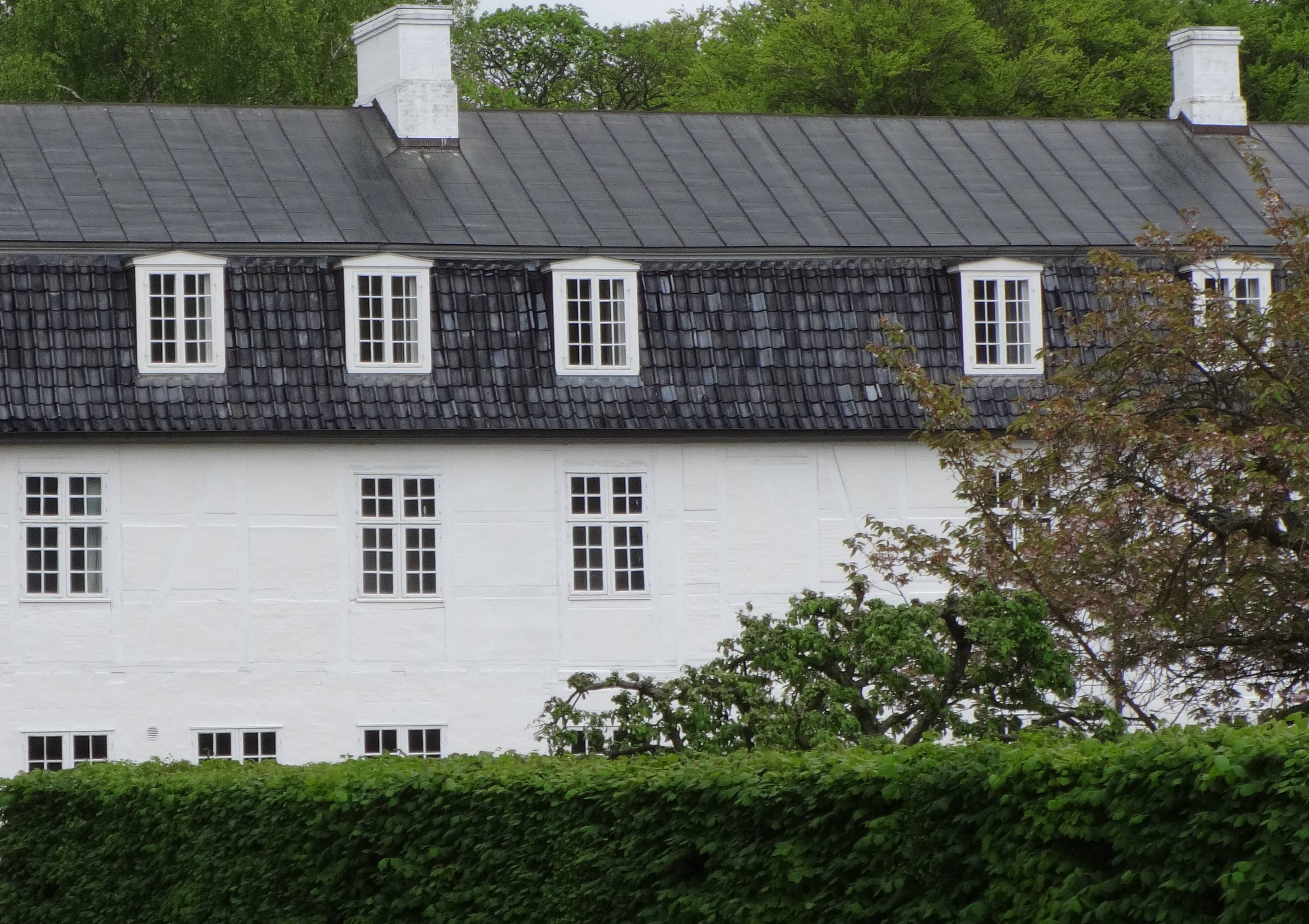 Schloss Sorgenfri: Seitenflügel Damebygningen, Details